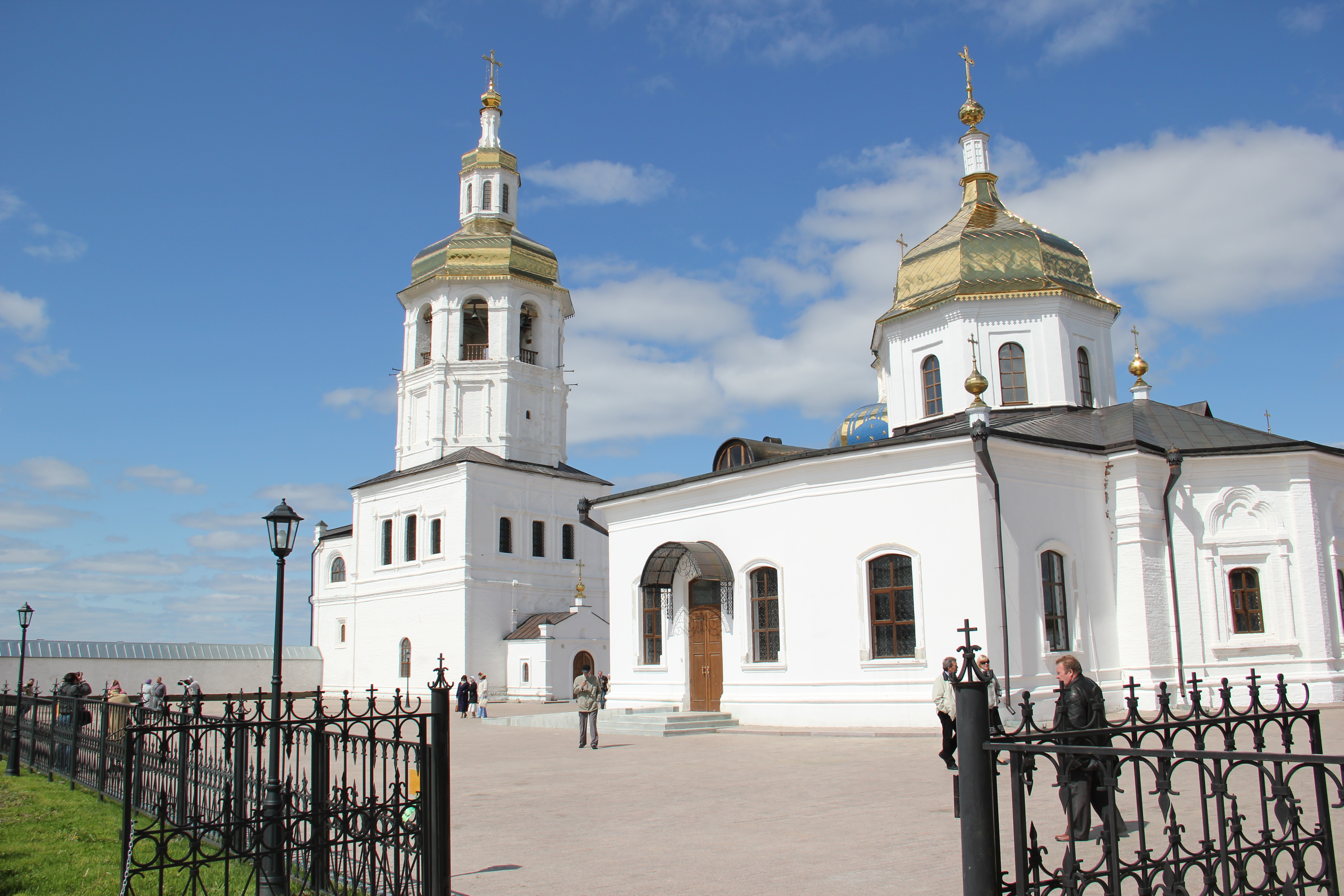 Никольская церковь (Тюменская область, Тобольск, село Абалак)